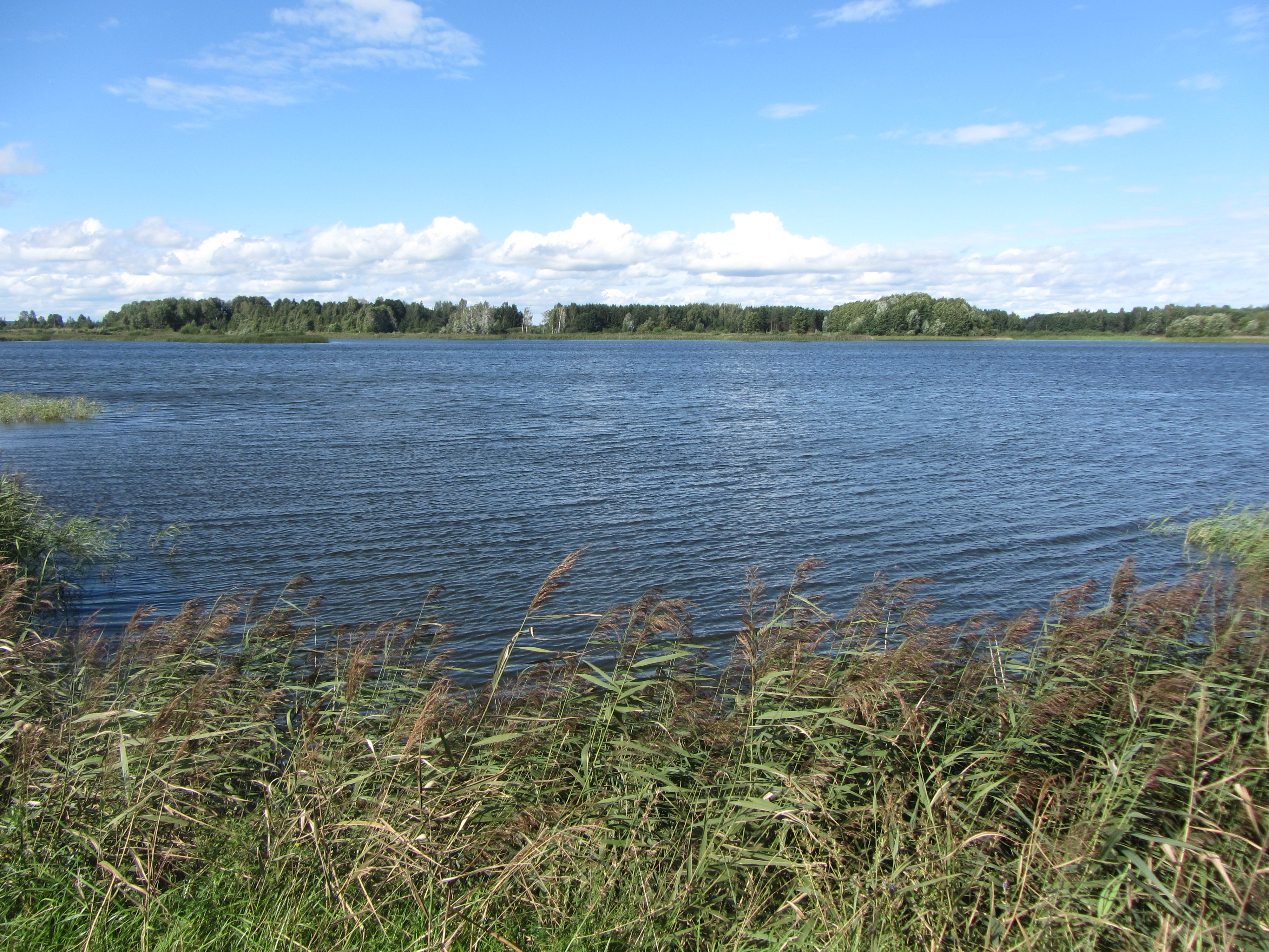 Daugų sen., Lithuania